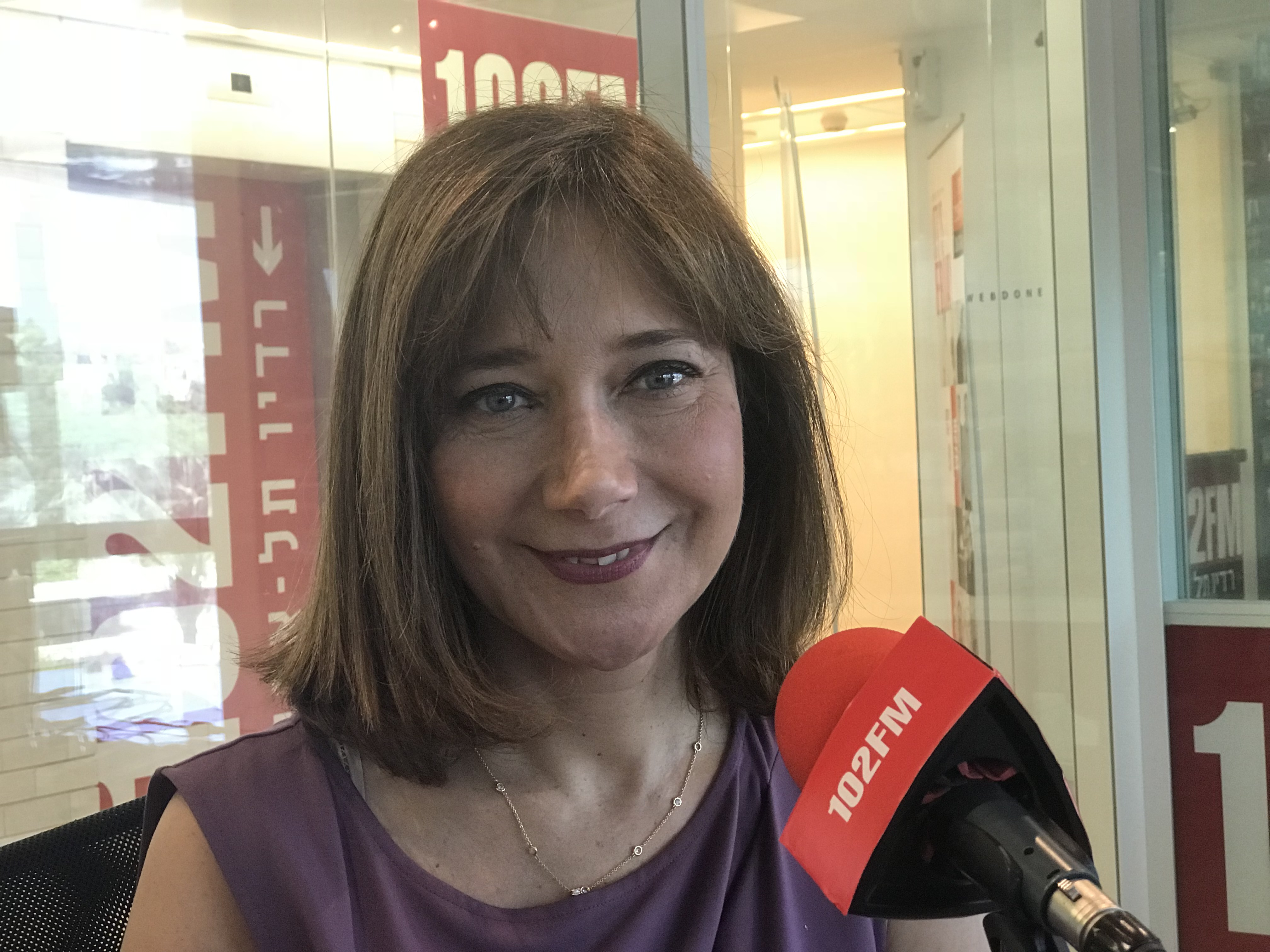 חברת הכנסת רויטל סויד באולפן "פרלמנט שישי" עם רועי כ"ץ ברדיו תל אביב